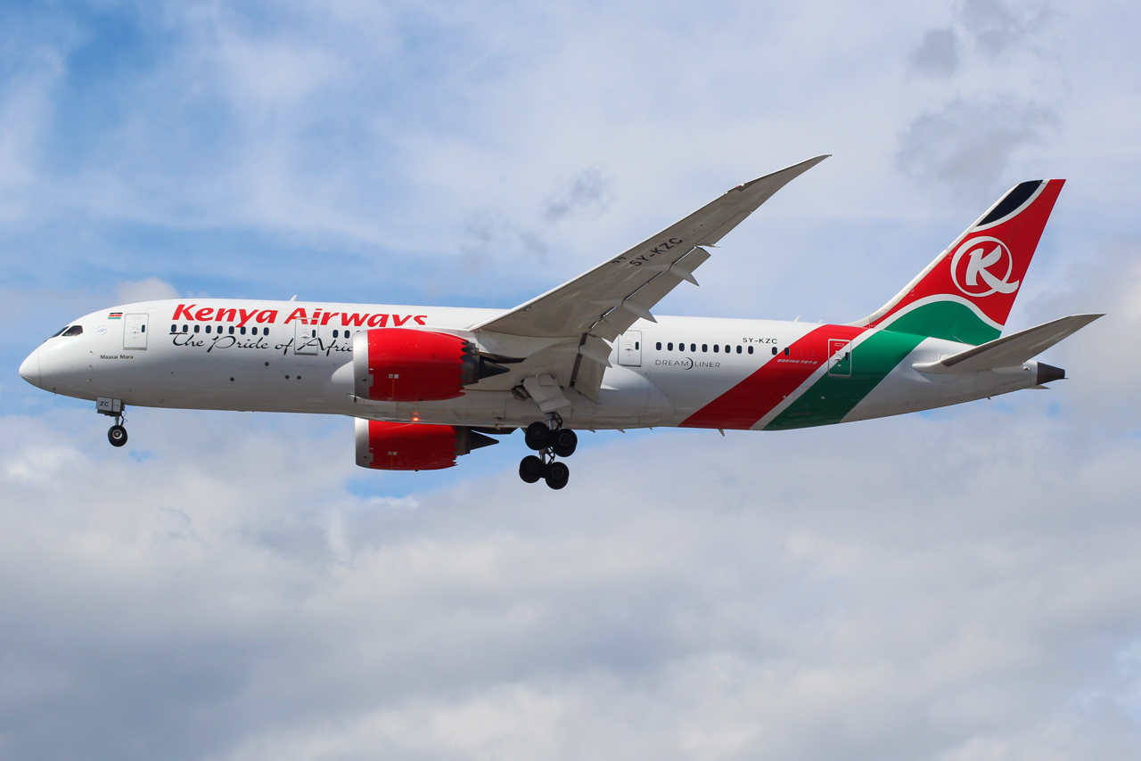 5Y-KZC Boeing 787 Kenya Airways